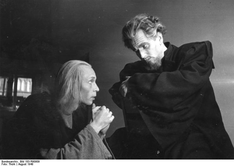 Weimar, Nationaltheater, Faust Illus-Thürk Nationaltheater Weimar, Wiedereröffnung am 28.8.48 Goethe-"Faust"-Studierzimmerszene, Faust und Famulus Wagner (Gerhard Becker und Walter Jupé) 2041-48 Abgebildete Personen: Jupe, Walter: Schauspieler, DDR